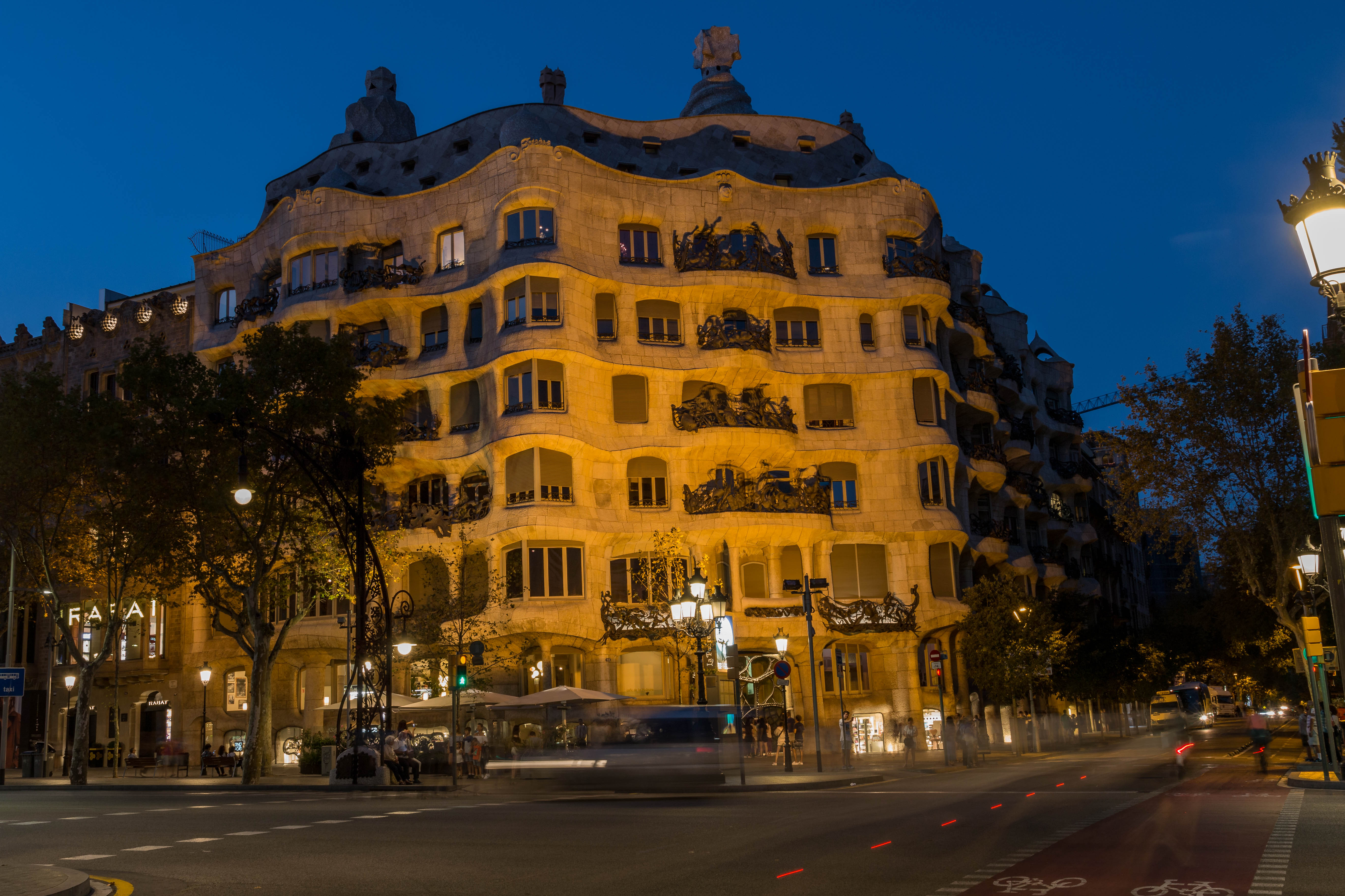 Casa Milà